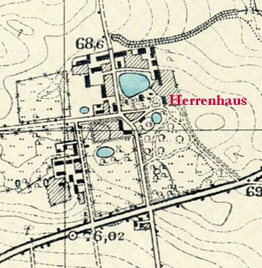 Messtischblatt Bartenstein Nr. 475